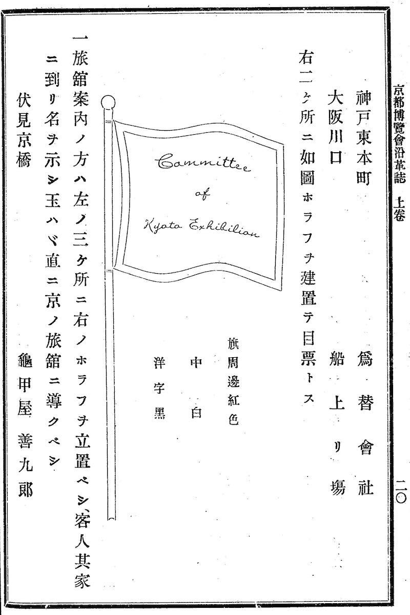 京都博覧会沿革誌。1872年の京都博覧会で外国人に向けた標識に使われた旗が図示されている。